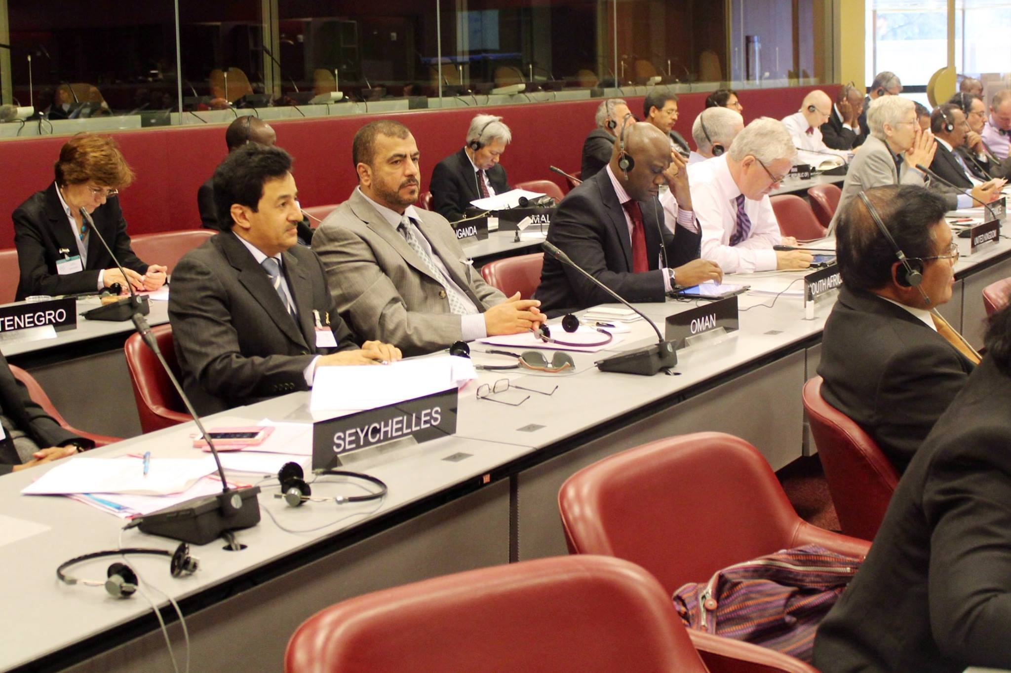 في جنيف